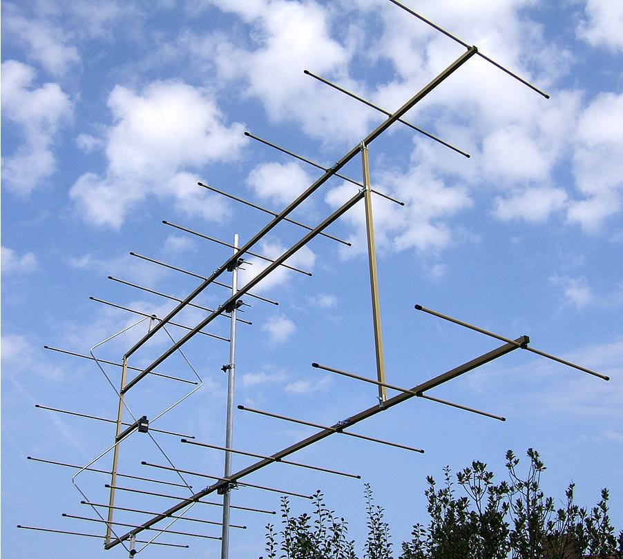 Doppelquadantenne